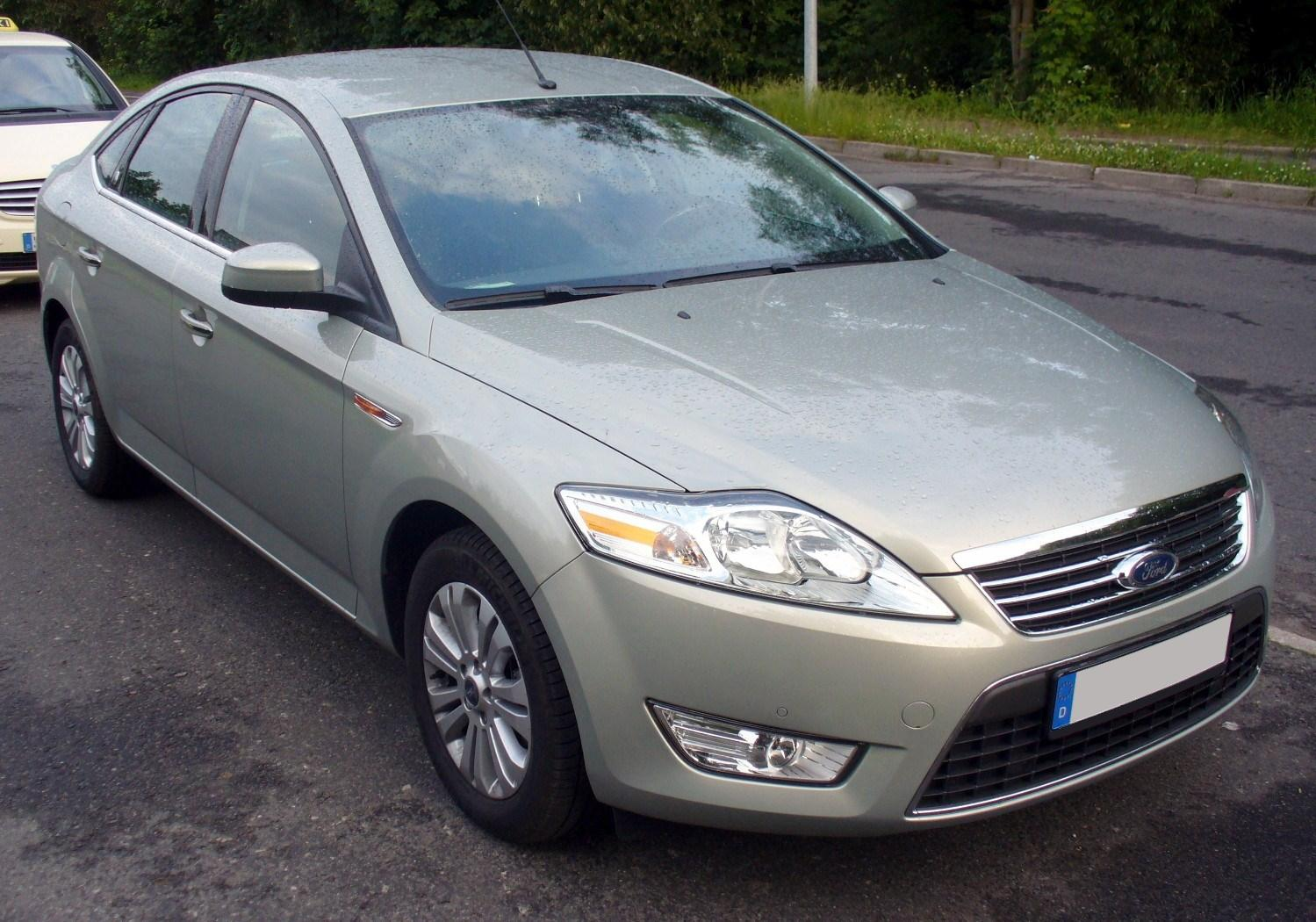 Ford Mondeo Mk IV